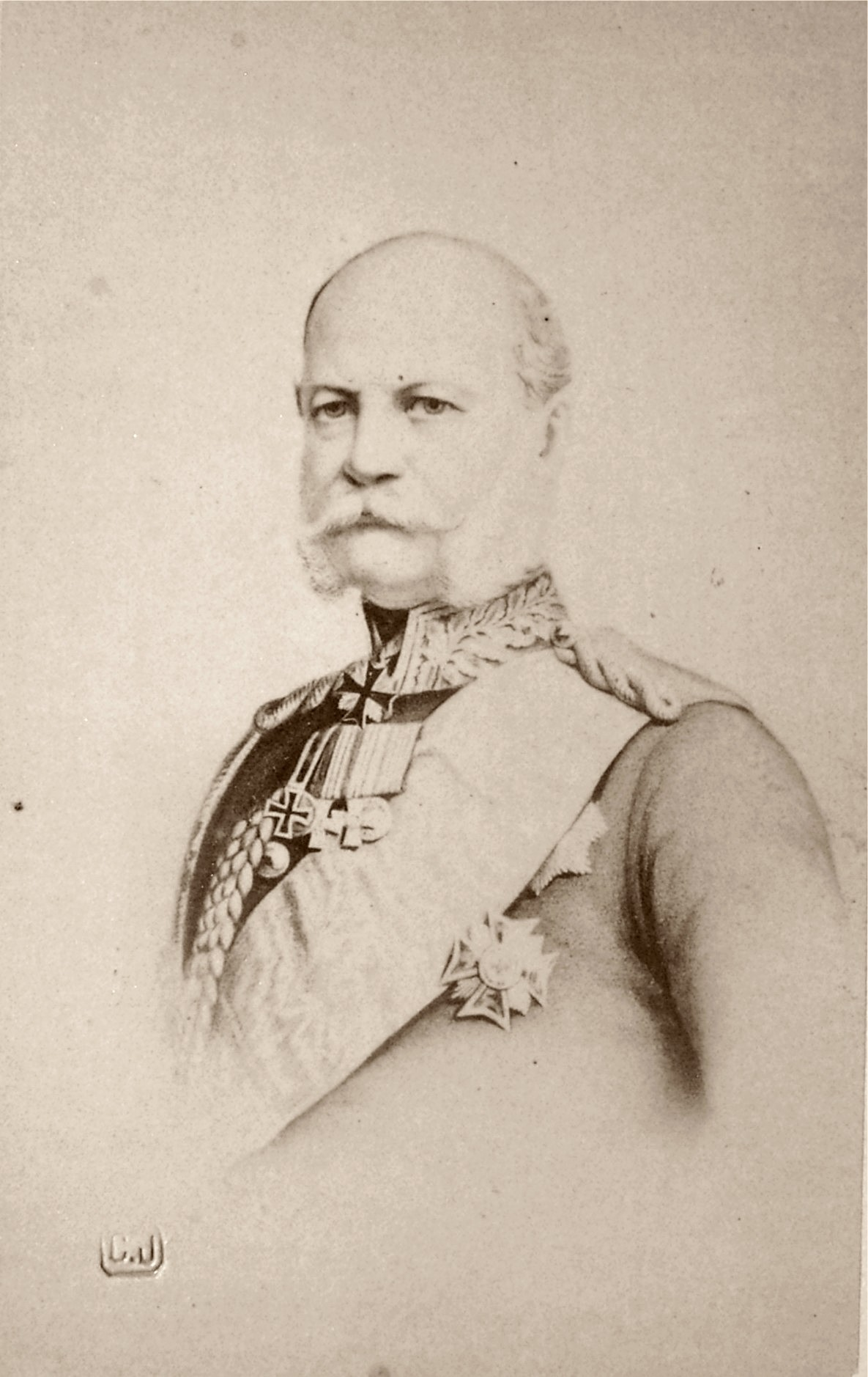 Prinz Wilhelm von Preußen